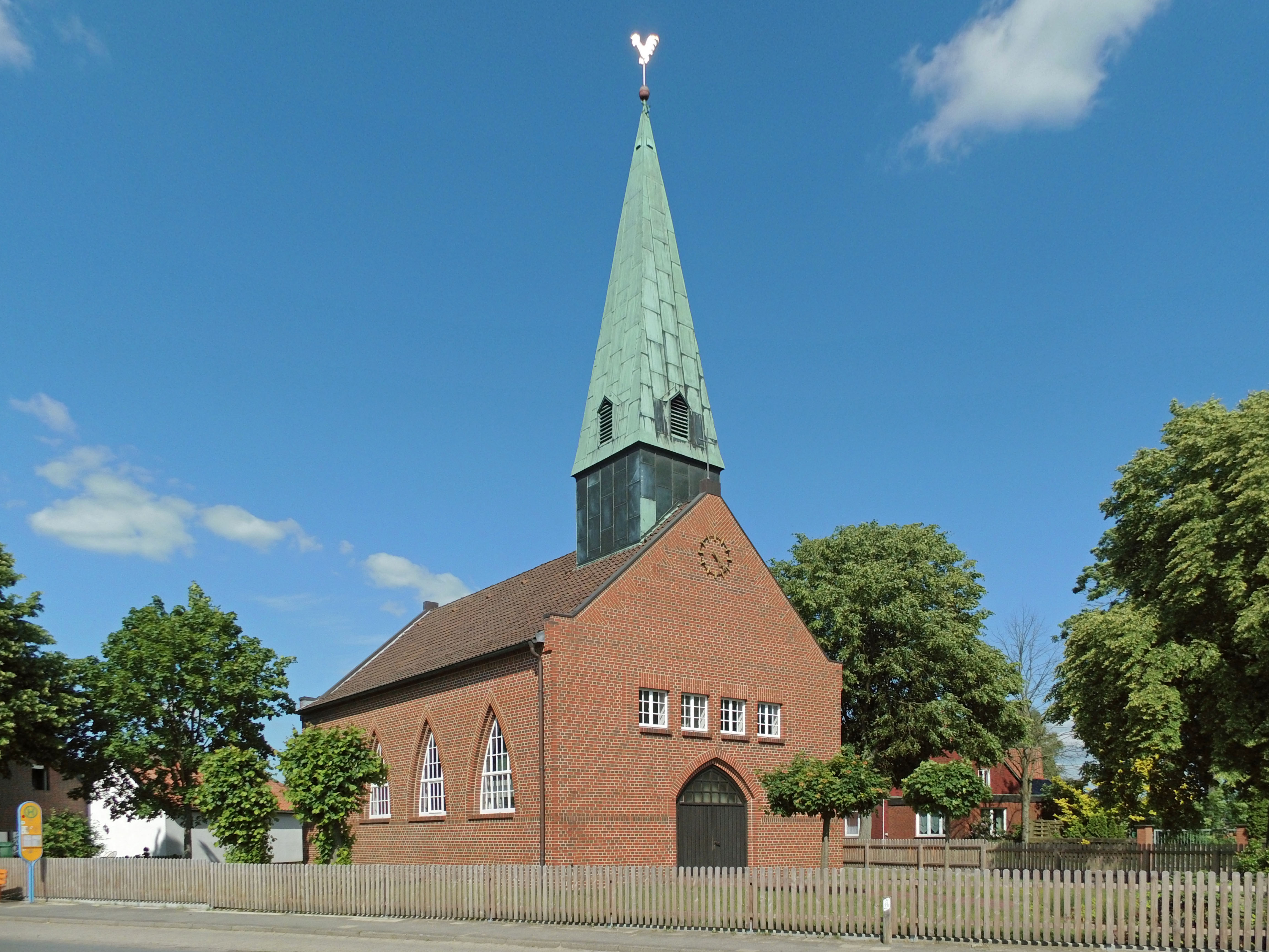 Evangelisch-lutherische St.-Johannis-Kirche in Tülau (Landkreis Gifhorn)